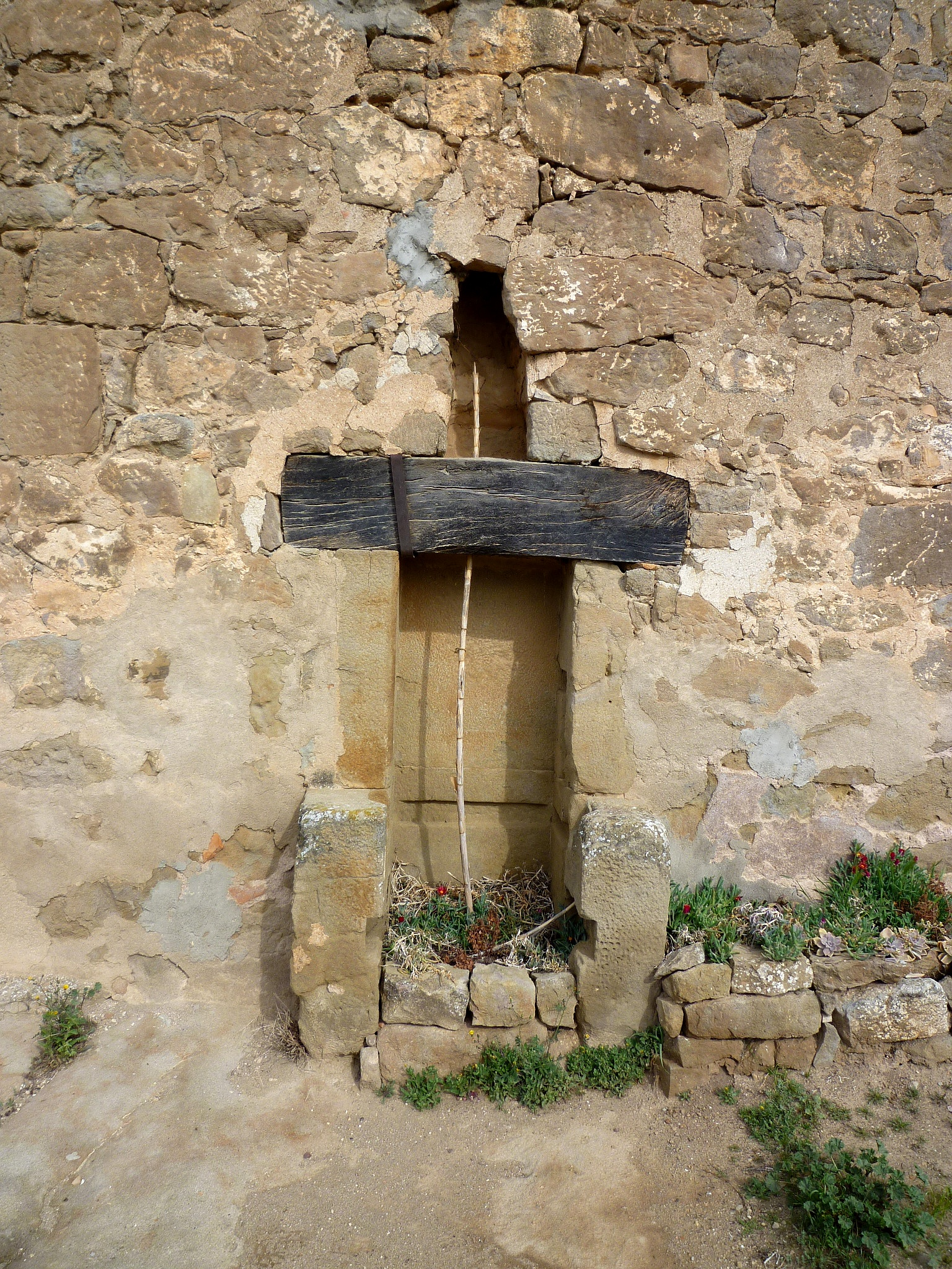 Masia Grifè (Biosca): premsa del ví